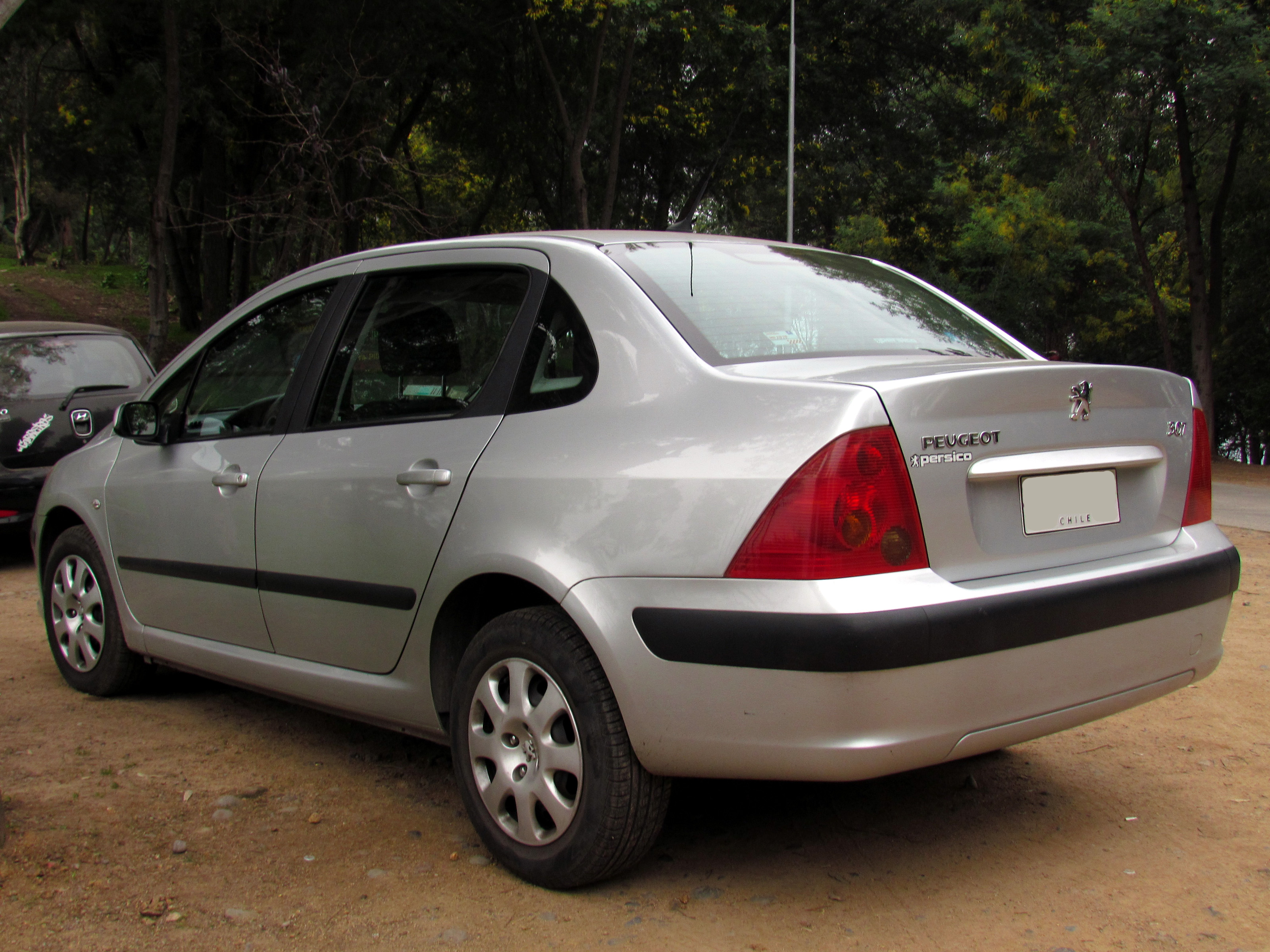 Peugeot 307 1.6 X-Line Sedan 2007